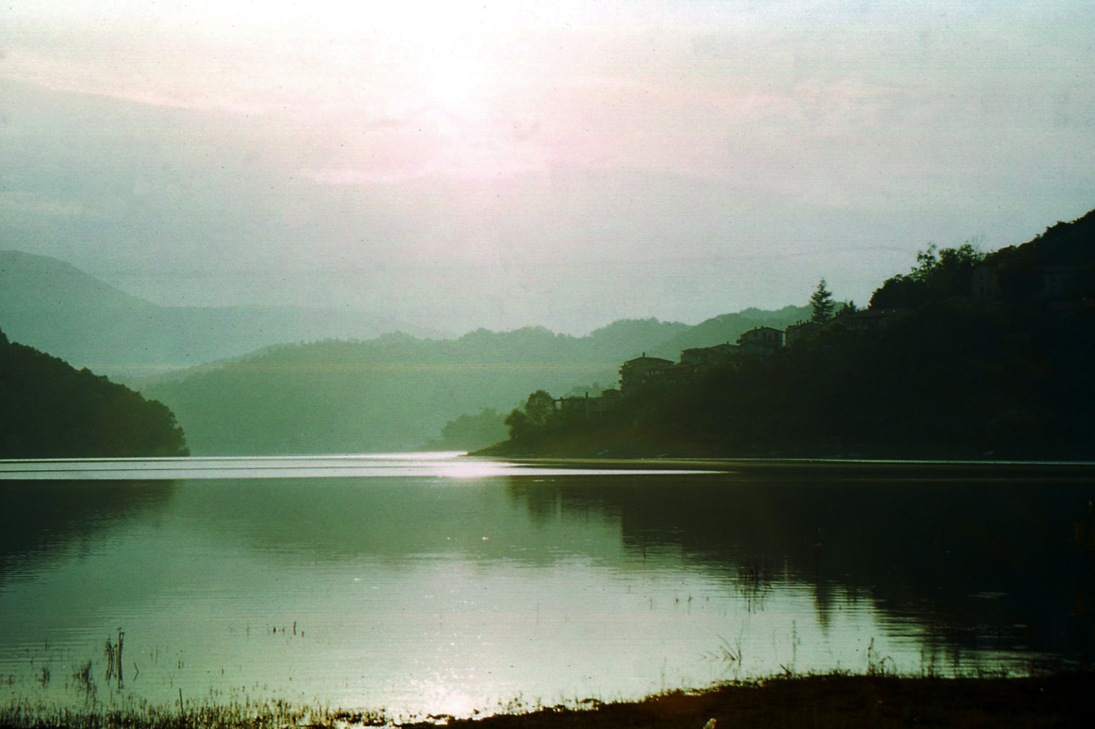 Pomeriggio estivo al Lago del Salto - vista di Fiumata di Petrella Salto